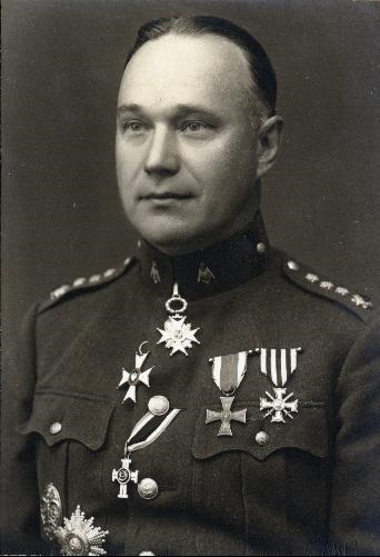 Vabadusristi kavaler, kindralmajor Herbert Brede (1888–1942)